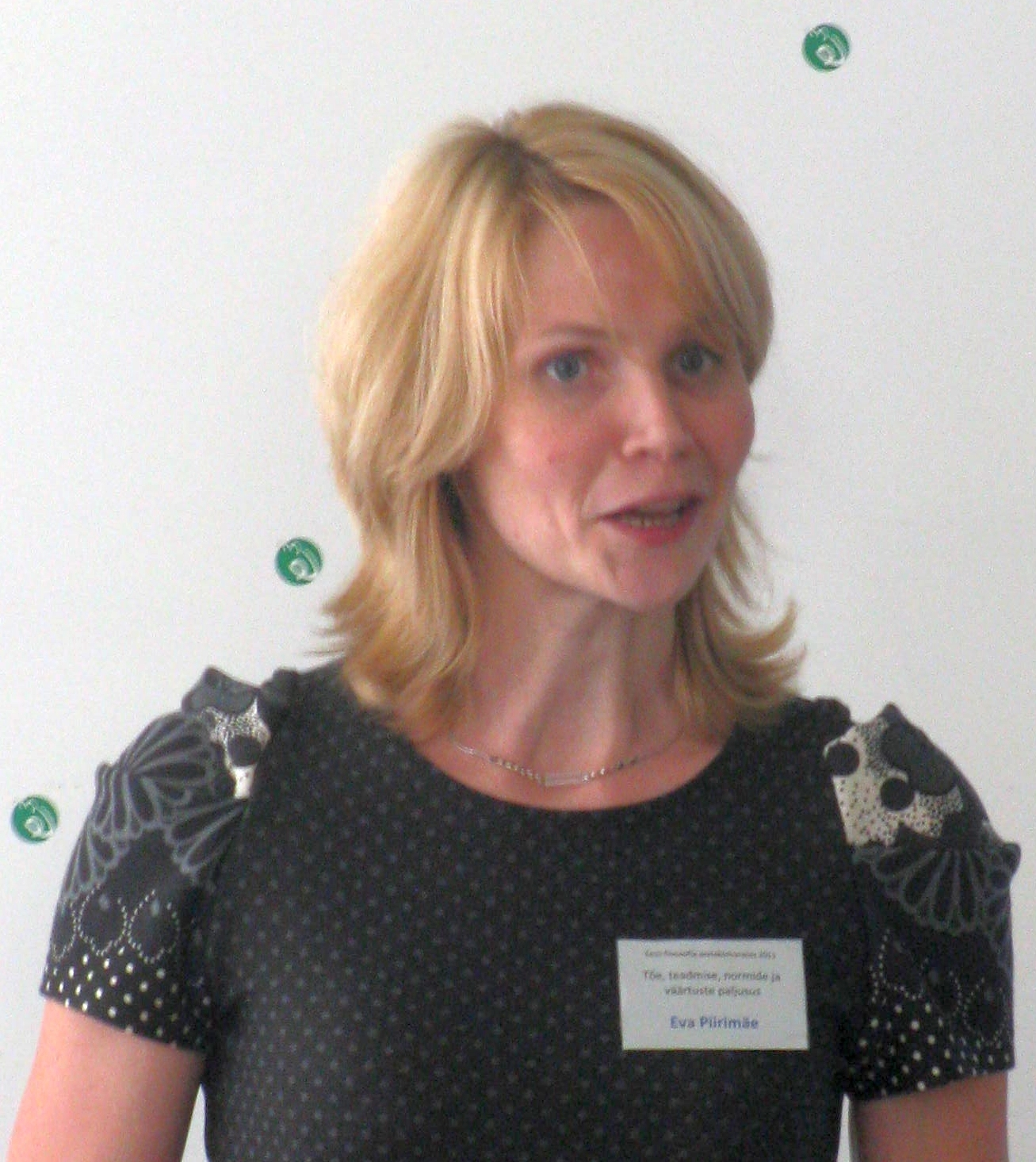 Eva Piirimäe Eesti filosoofia 7. aastakonverentsil Tartus, 30. augustil 2011